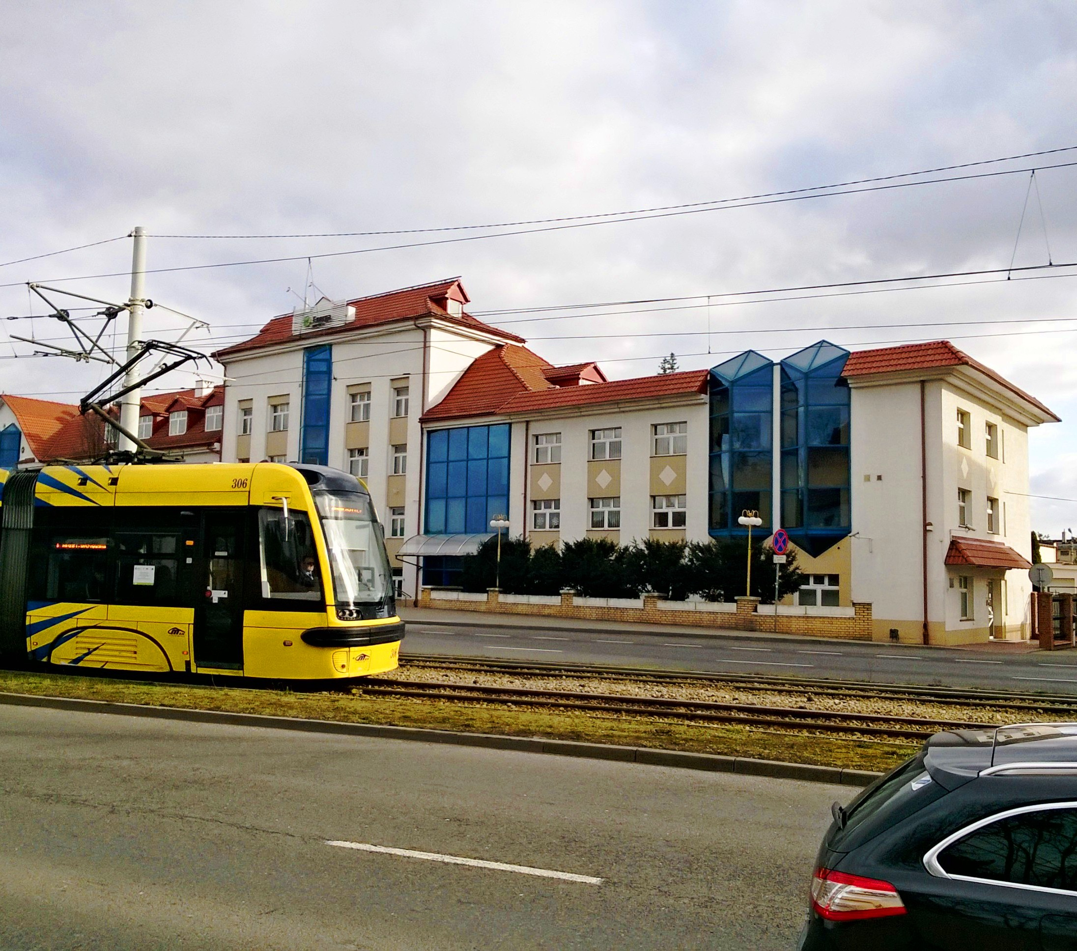 Zakład Energetyczny w Toruniu